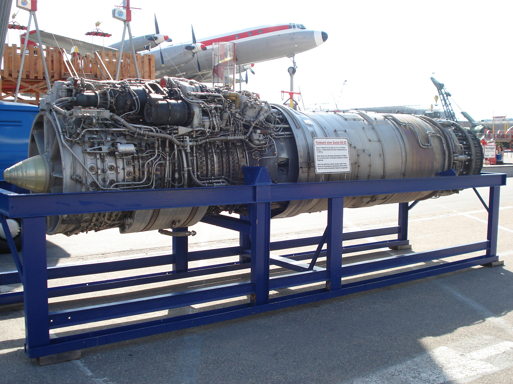 Ein Triebwerk eines Flugzeugs.